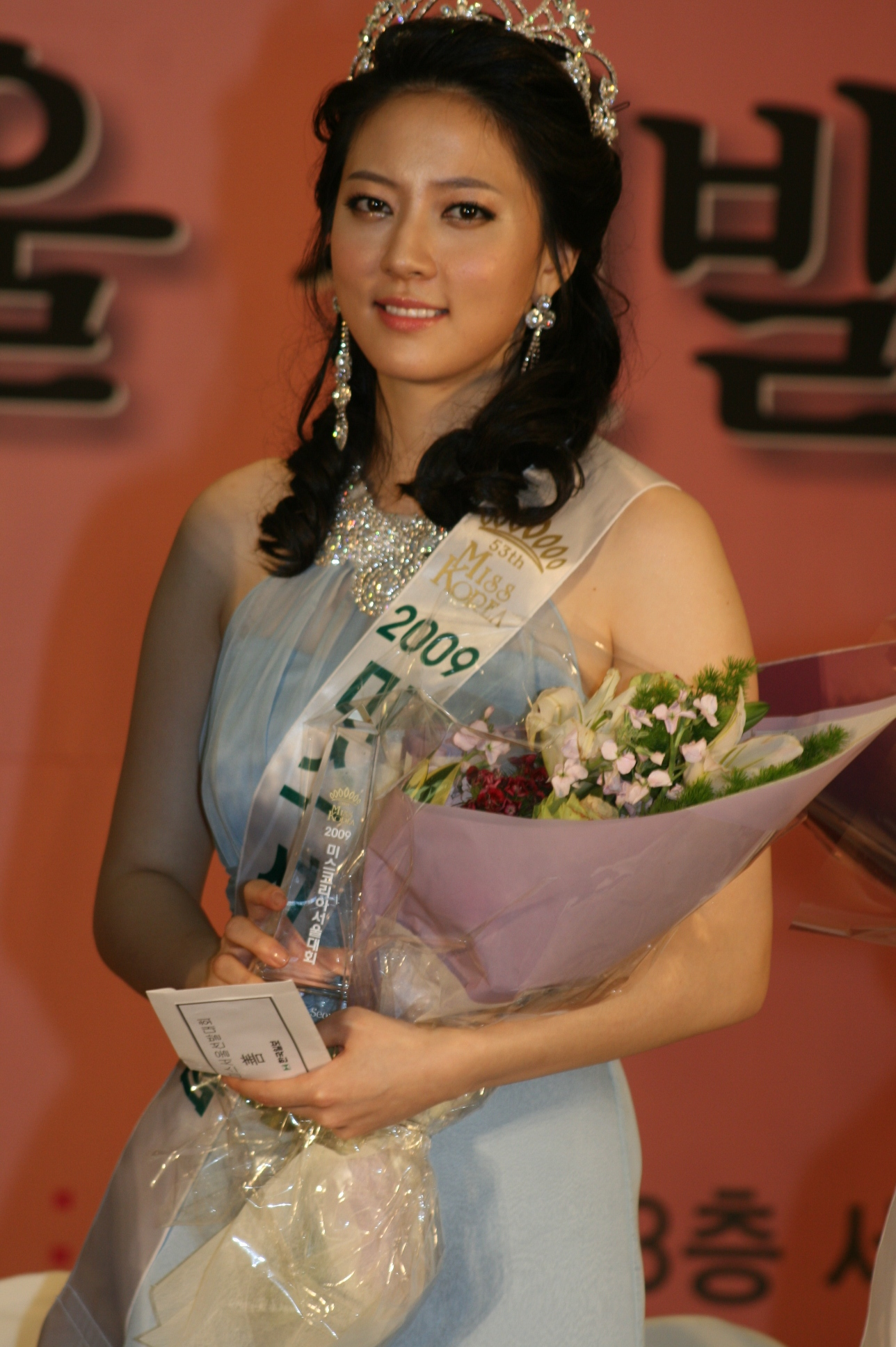 2009 미스코리아 서울 선 왕지혜